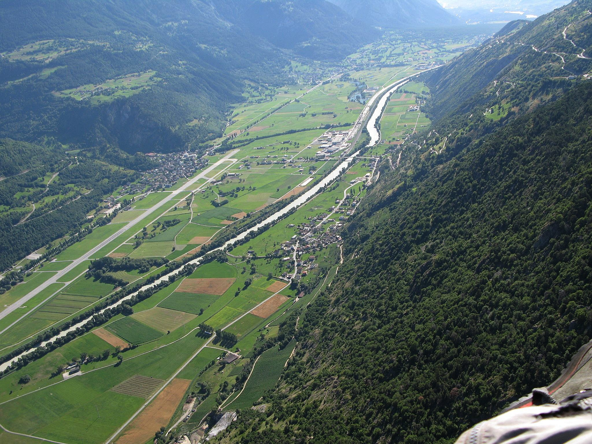 Vista aeroporto Turtmann, 10.7.2008